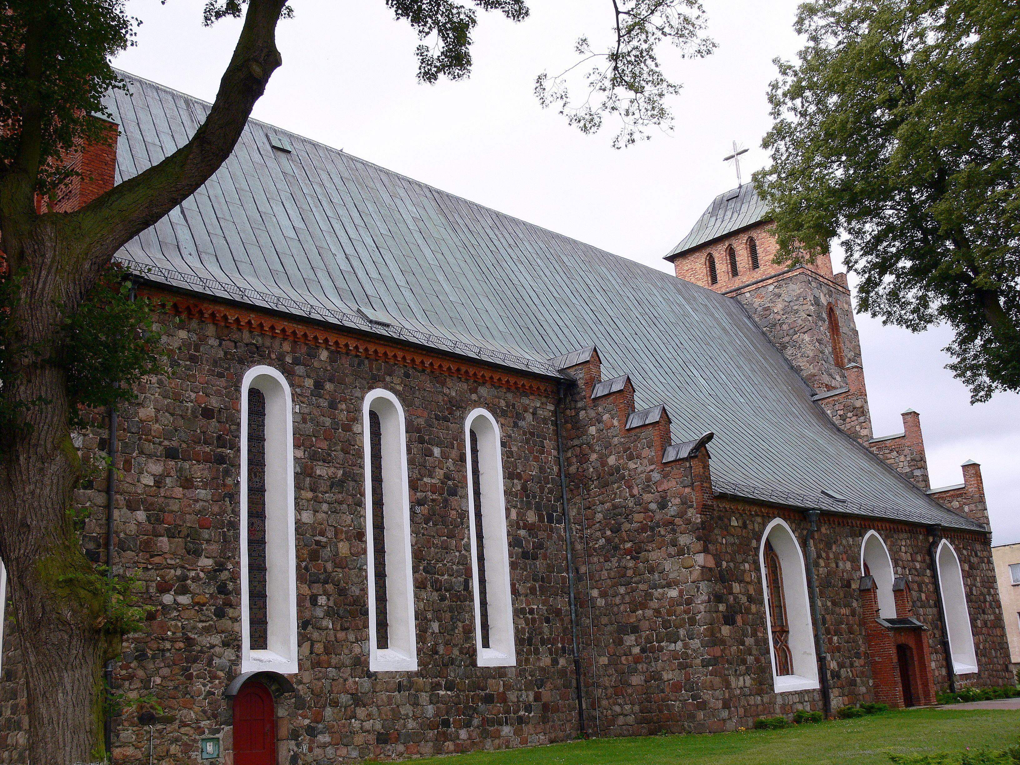 kościół w Baniach